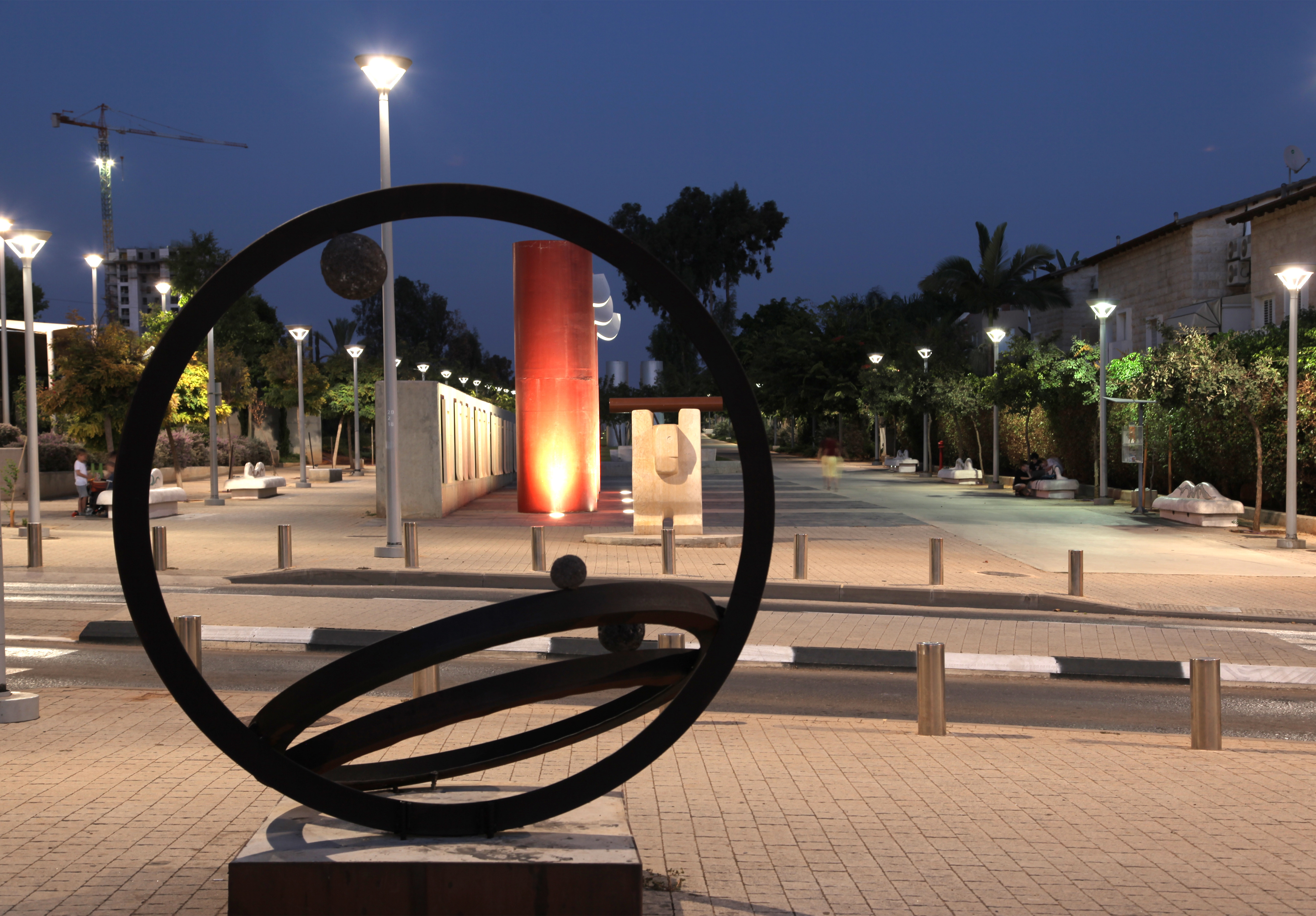 מתחם שדרת התקוות, גני תקווה